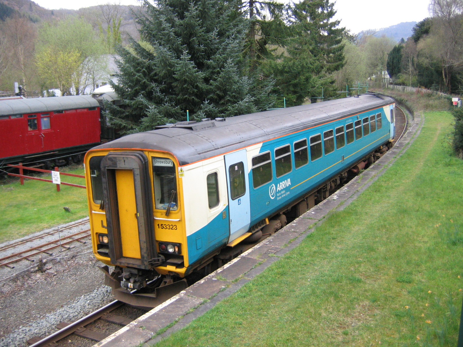 153323 at Betws-y-coed